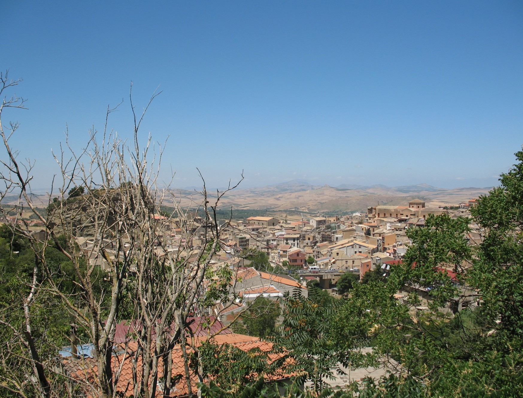 Corleone